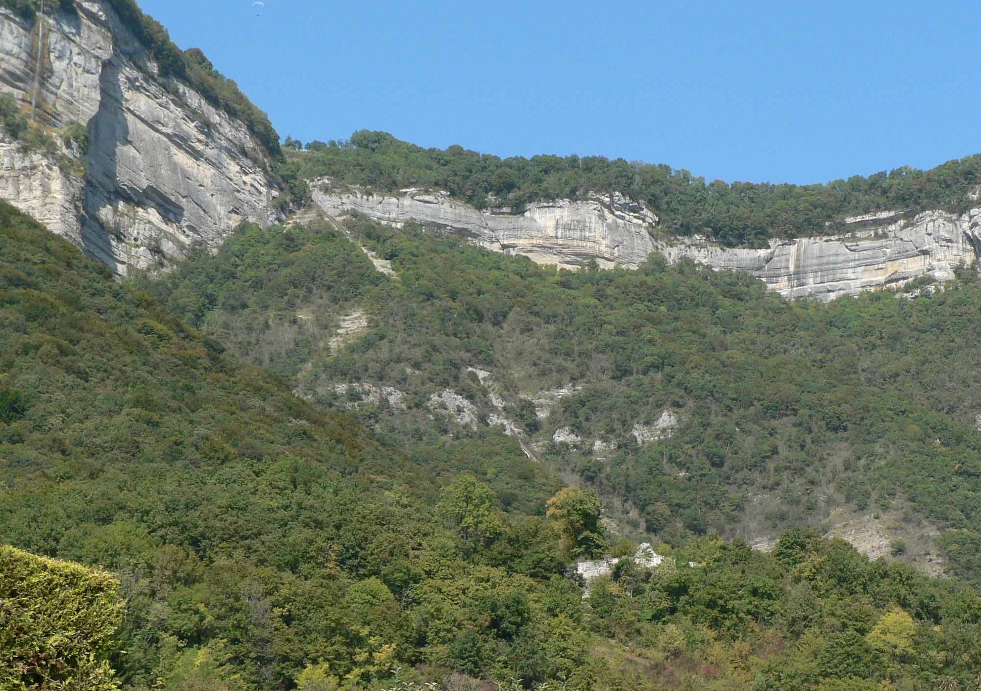 Château de Montfort et rails de la funiculaire de St Hilaire du Touvet depuis l'hameau de Montfort (les jours de la Coupe Icare).